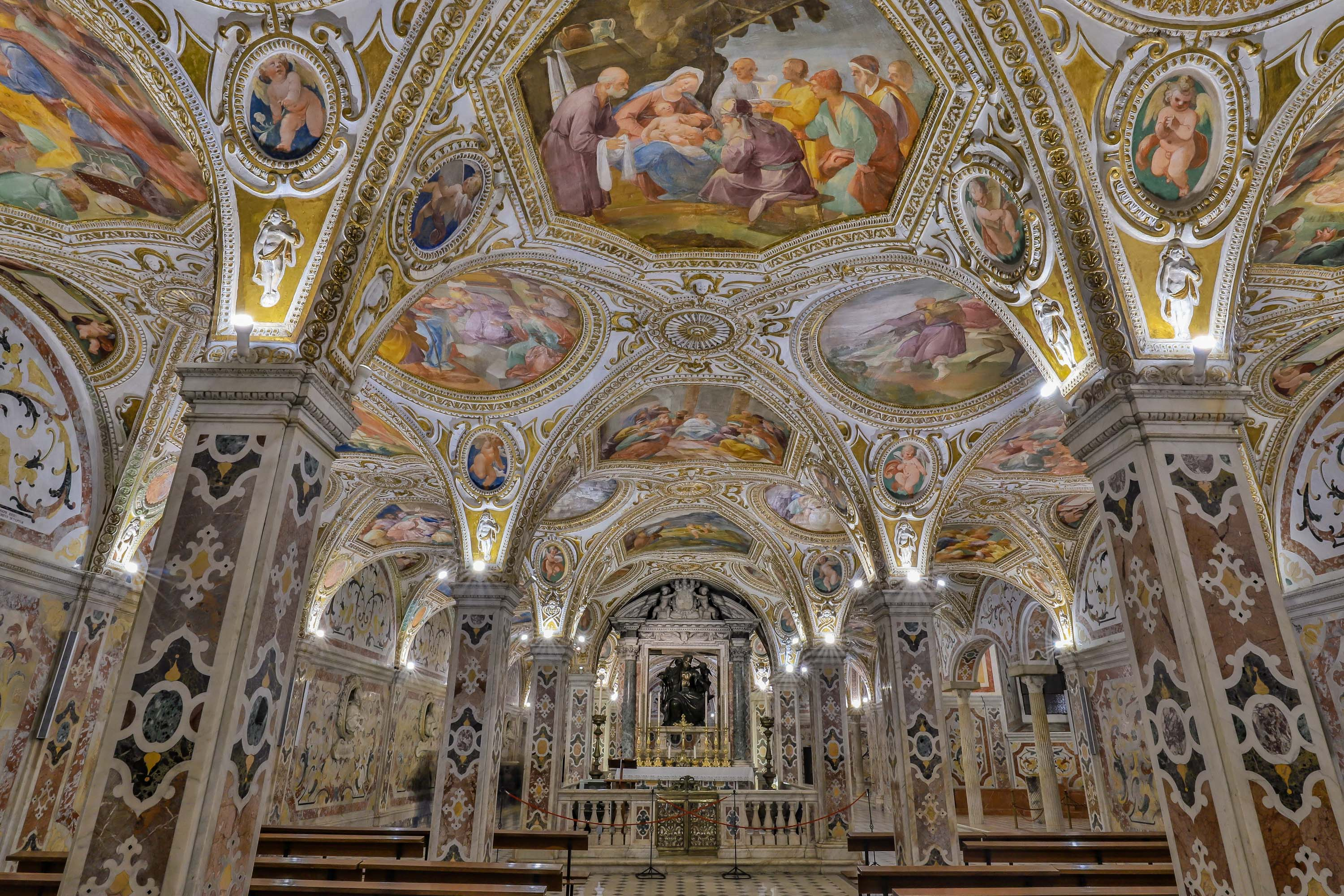 Interno della Cripta